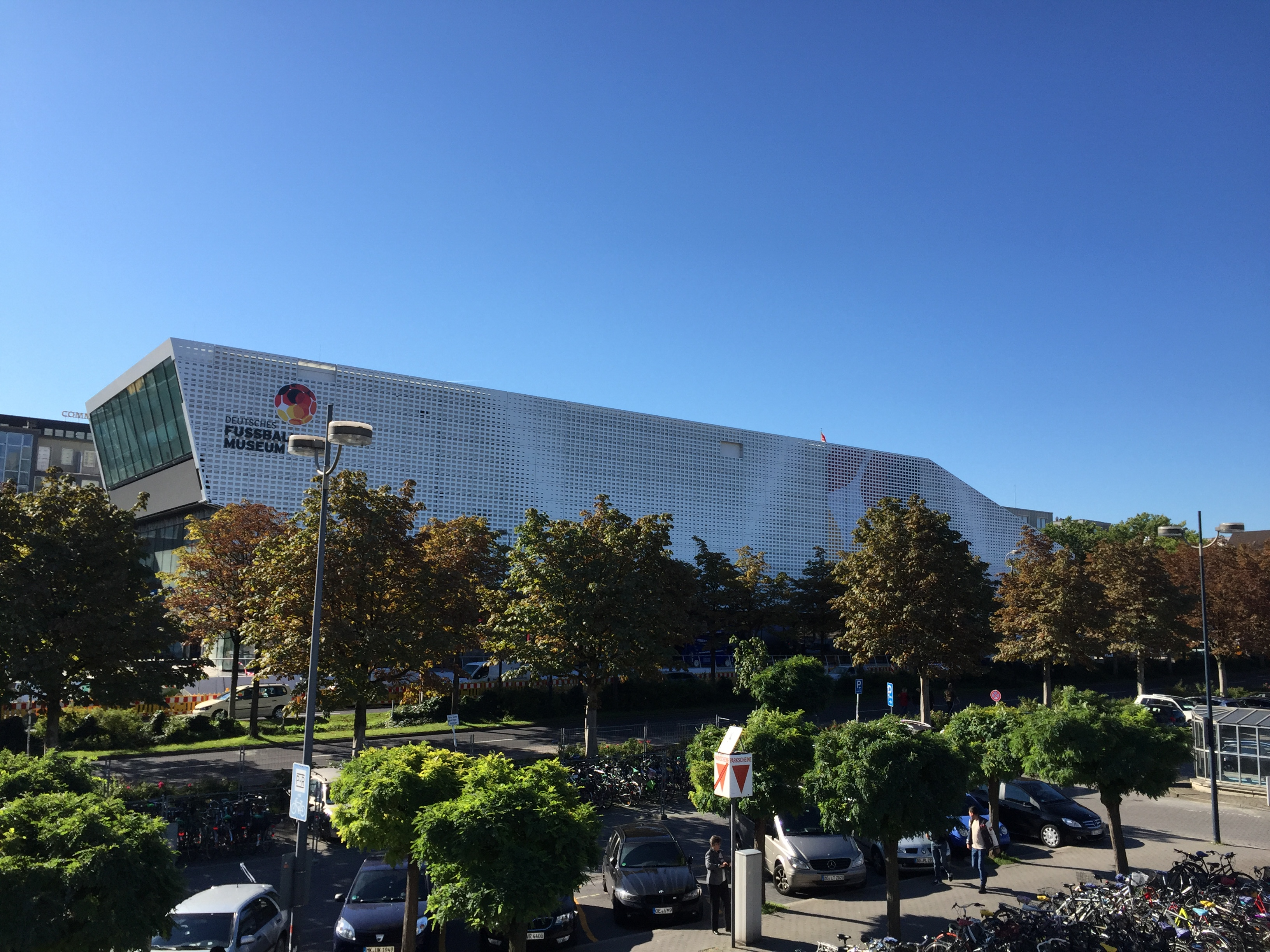 Blickrichtung Königswall